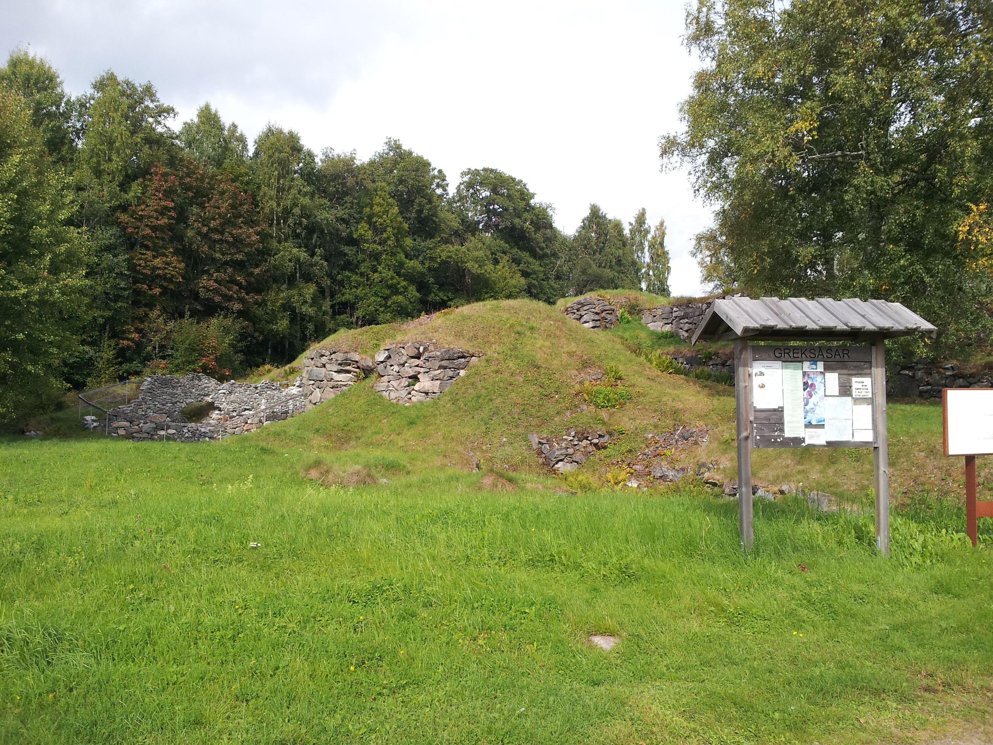 Hyttruin, Greksåsar, Nora bergslag